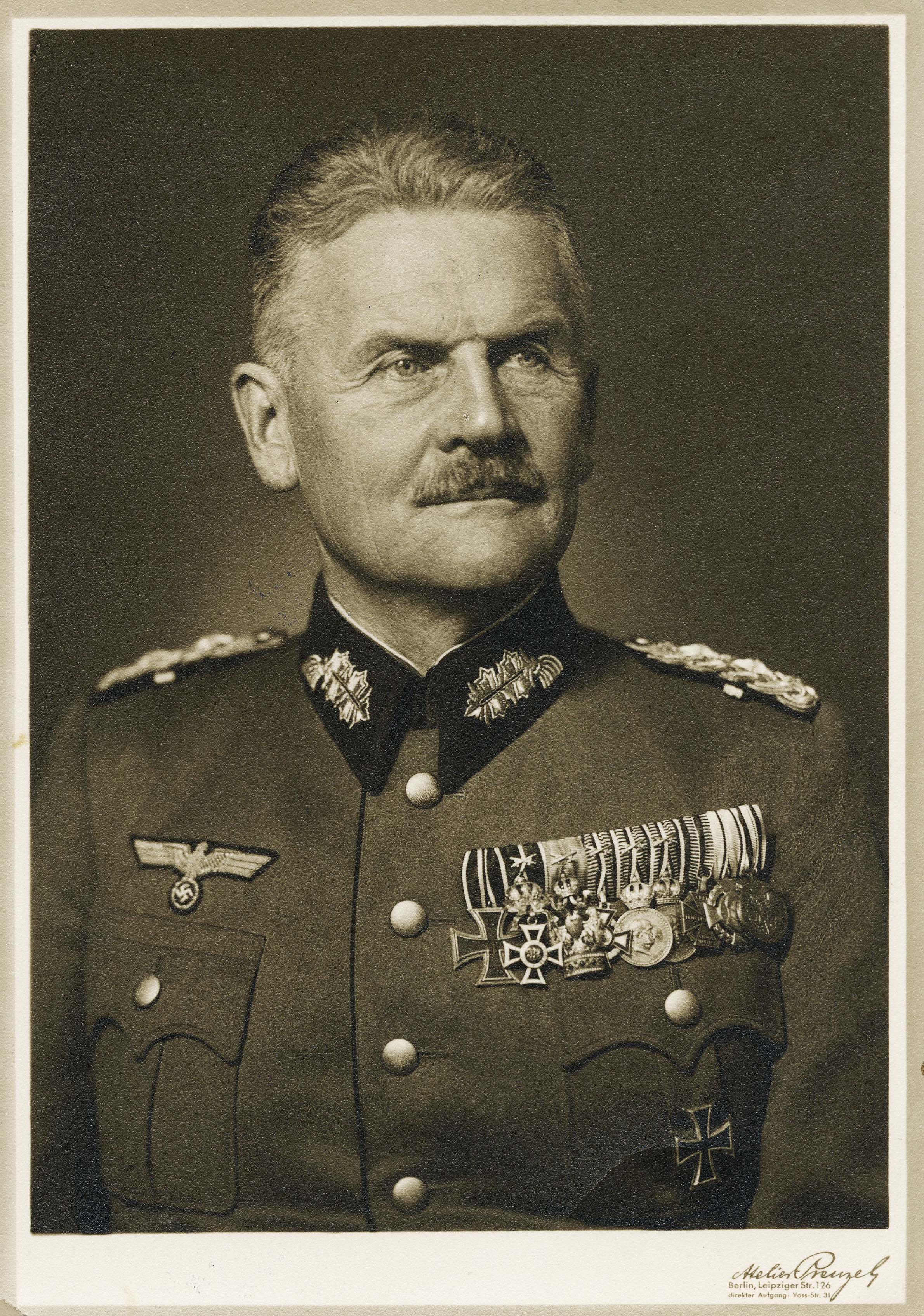 General Ludwig Ritter v. Eimannsberger